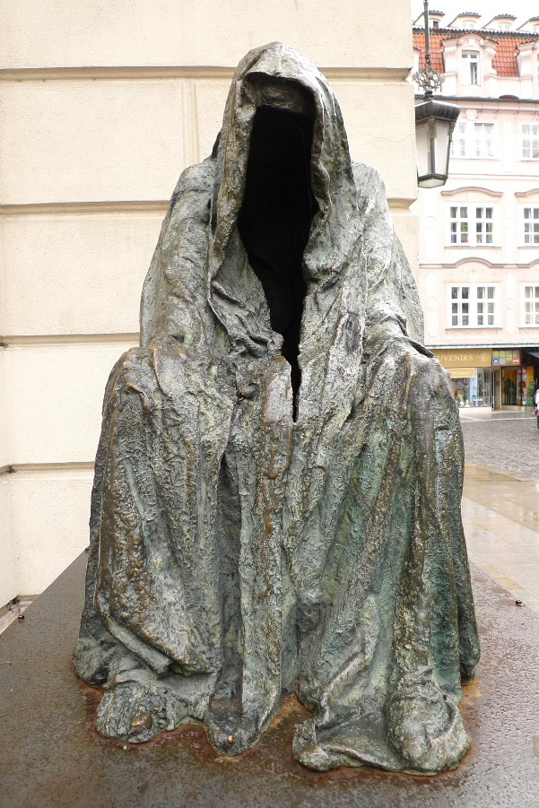 Prag- Anna Chromy: „Il Commendatore“ (1993)